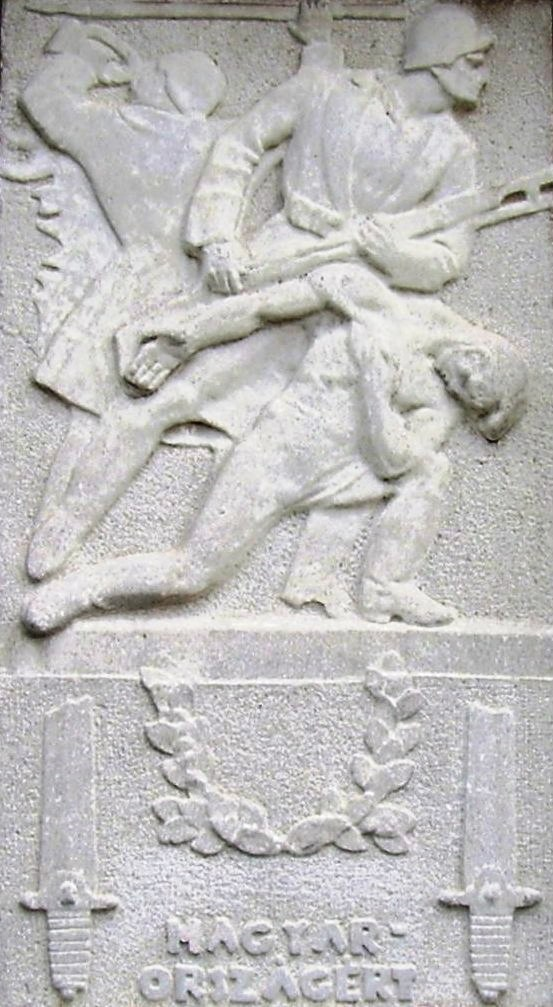 Relief on monument of heroes in Kazincbarcika